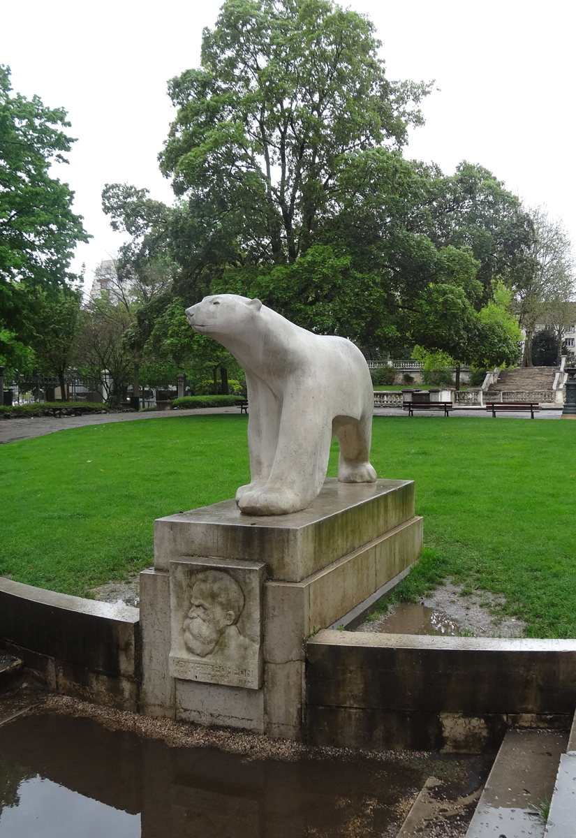 Eisbärenskulptur (Reproduktion des L'Ours blanc von François Pompon) im Jardin Darcy von Dijon.